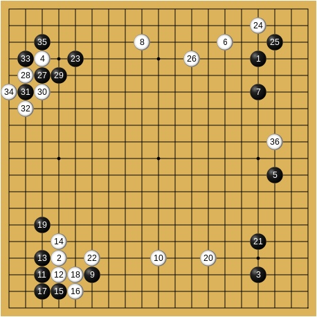 1978年3月22-23日 第2期棋聖戦挑戦手合七番勝負第5局 藤沢秀行棋聖-加藤劔正本因坊(先番) 1-50手目